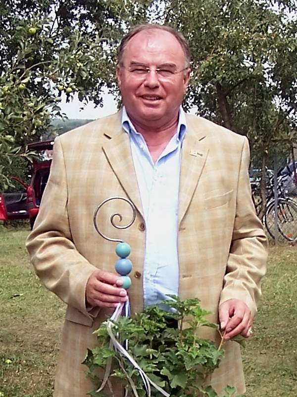 Günter Gabsteiger, MdL Bayern, CSU